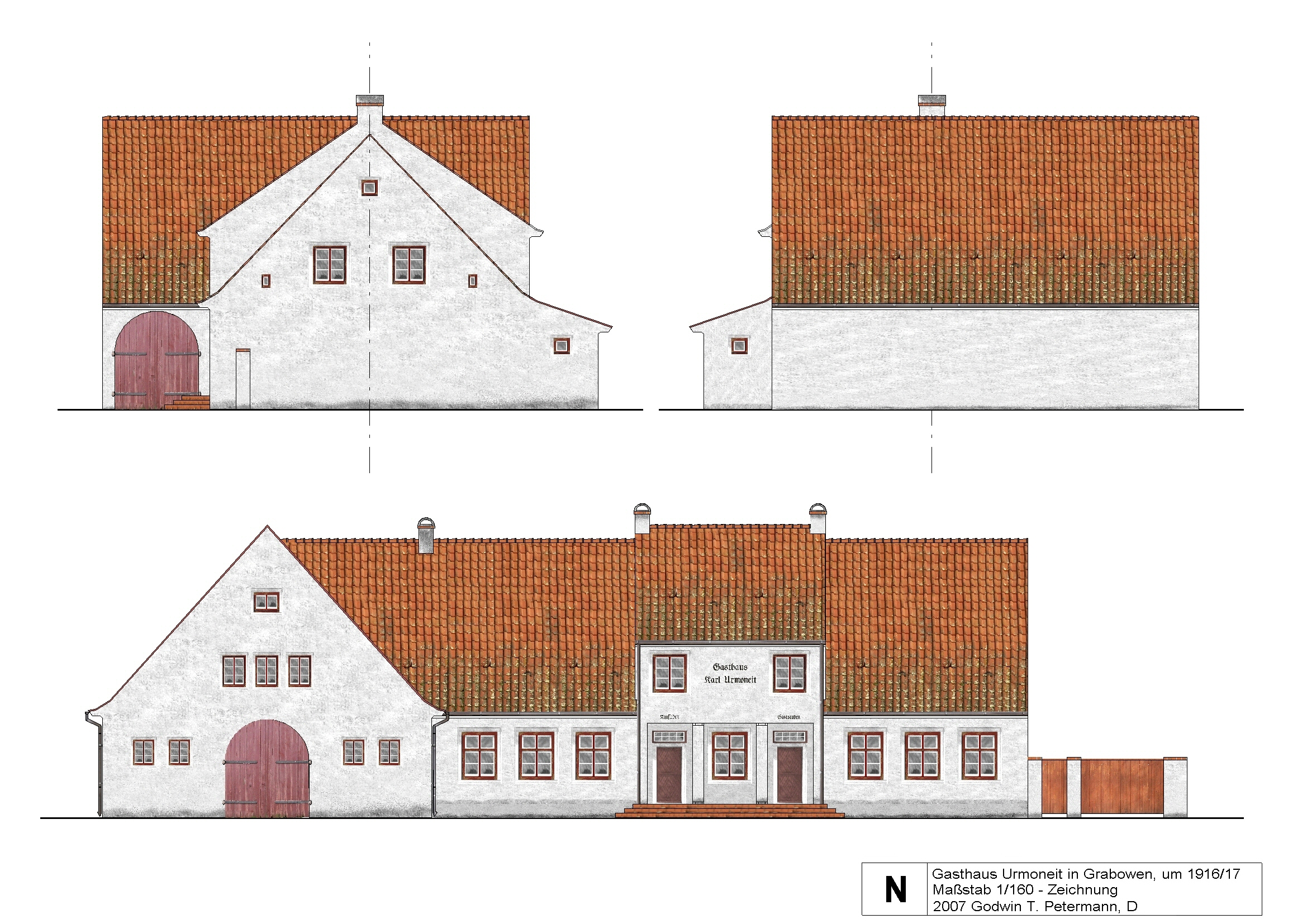 Plan karczmy w Grabowie Zeichnung des Gasthauses Karl Urmoneit in Grabowen von 1916/17 - Wiederaufbau Ostpreußens; Architekt: Hans J. Philipp, Goldap